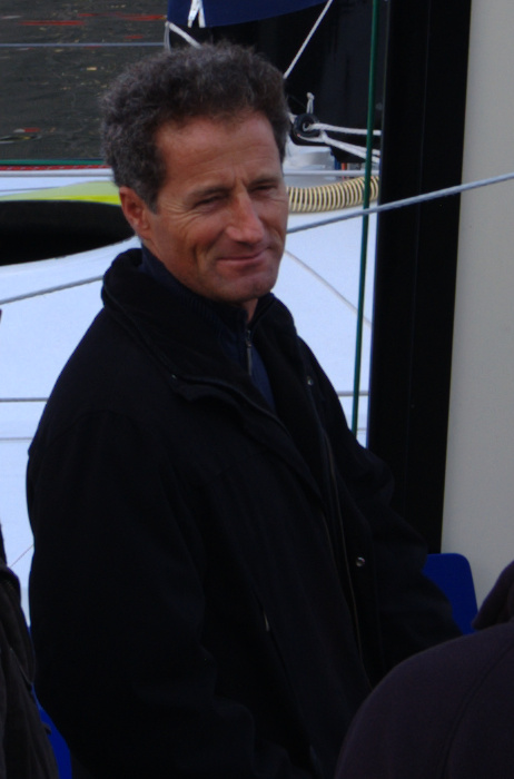 Le skipper Michel Desjoyeaux au Havre lors de la Transat Jacques Vabre 2011.